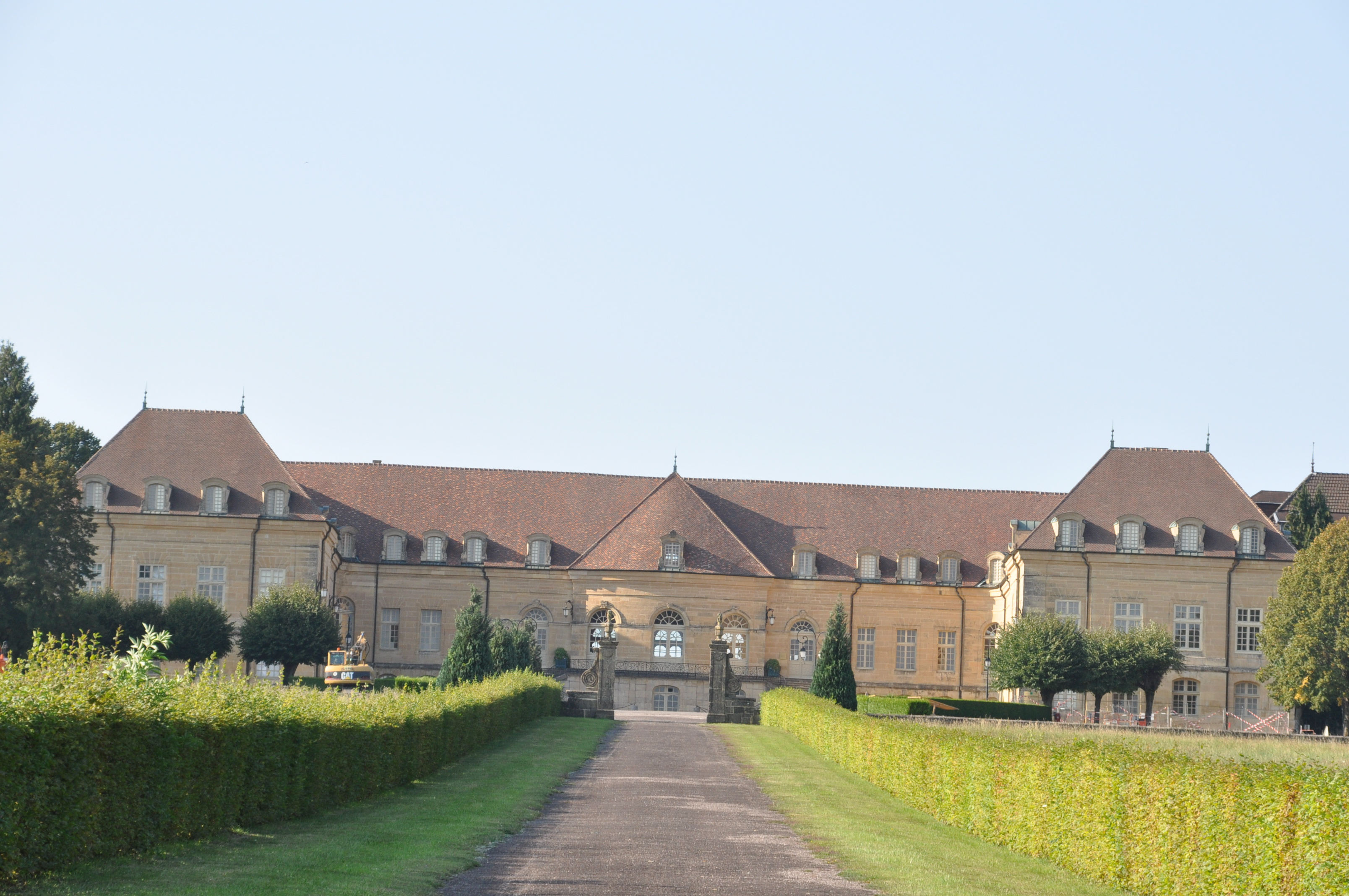 Château de Saint-Remy, (Classé, 1931) .